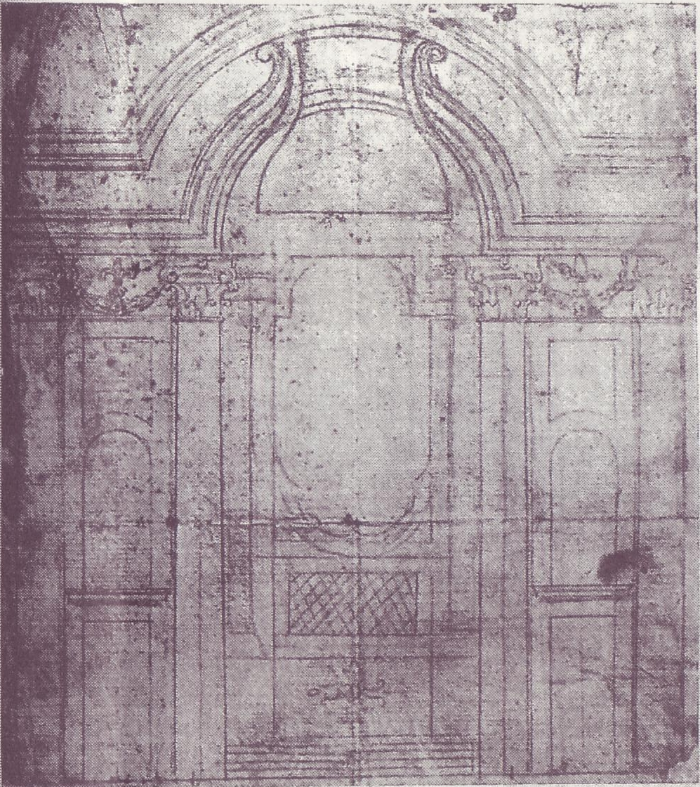 Detailentwurf für die Eingangs- bzw. Chorwand der Kirche Santa Maria dei Sette Dolori, Wien, Albertina, Inventarnr. 642